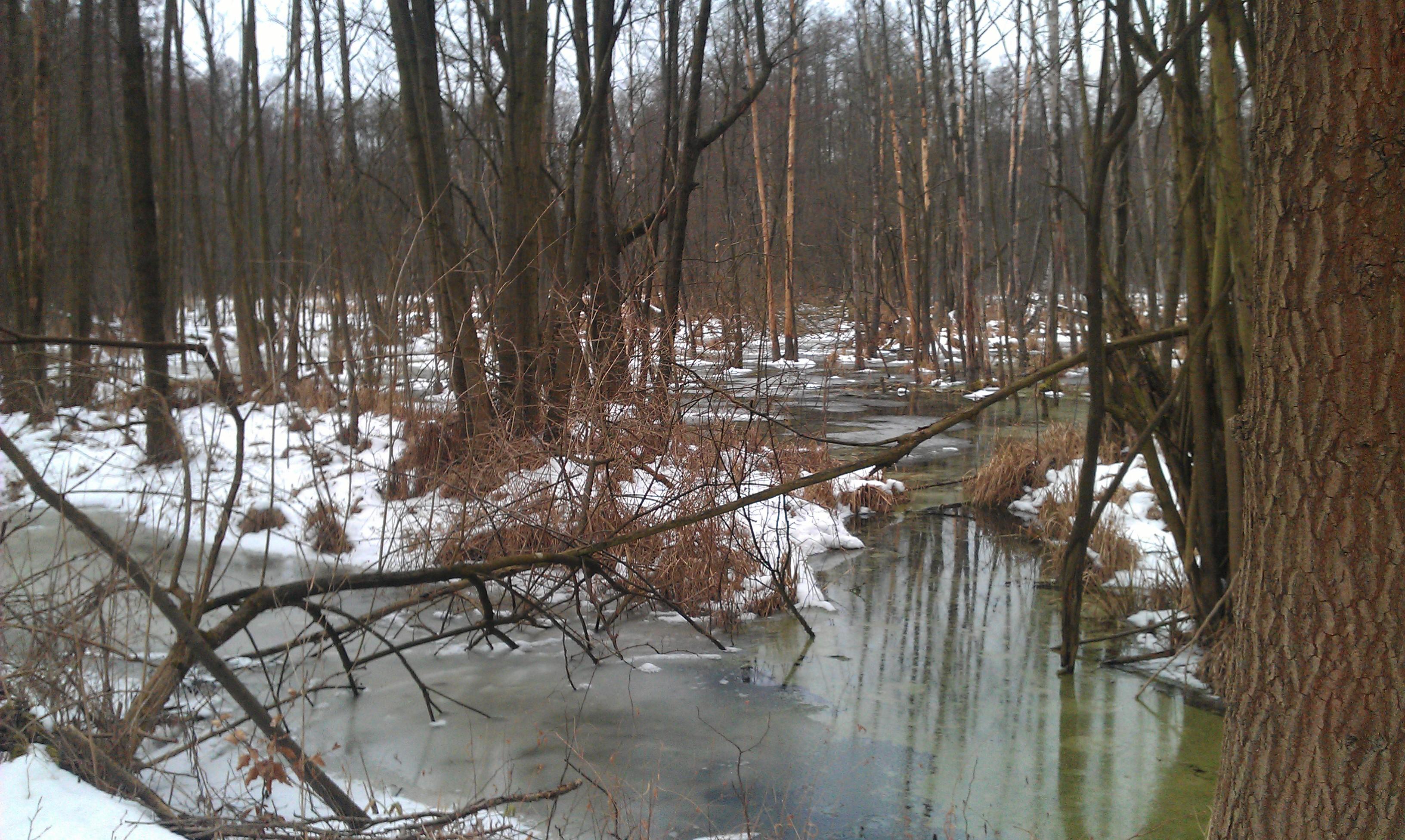 Das Naturschutzgebiet Triebschsee an der Südseite in Blickrichtung Oder-Spree-Kanal.